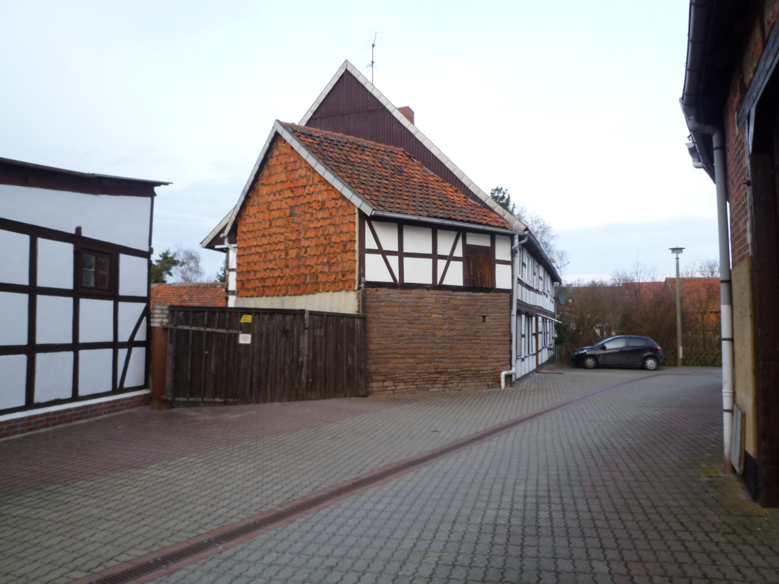 Der Ackerbürgerhof in der Halbenmondstraße 6 (Calvörde), Seitenansicht